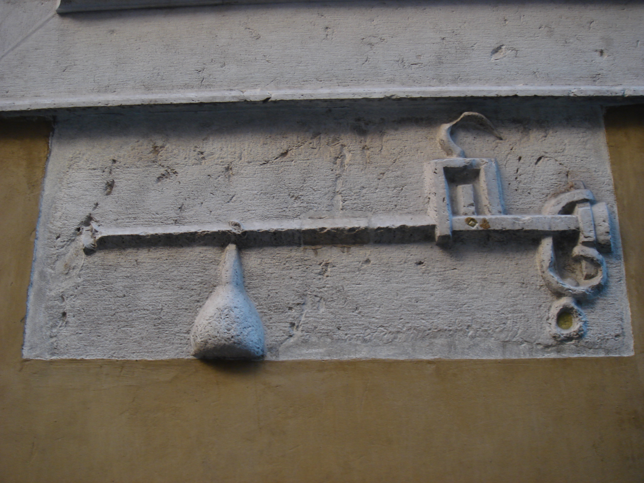 Palazzo delle Mercanzie (Brescia). Bassorilievo che rappresenta la stadera.